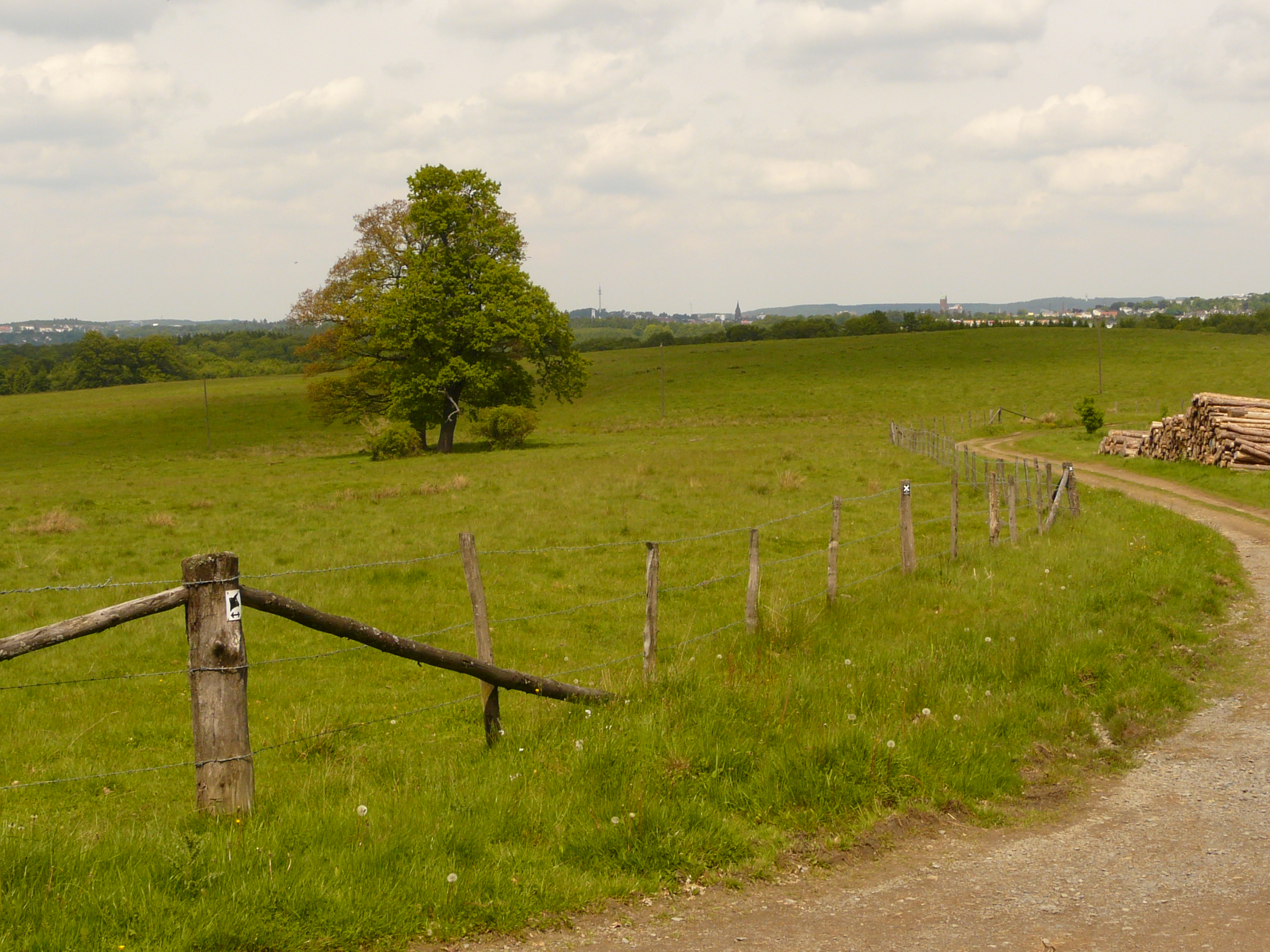 NSG MK-043 Stilleking: Fast das gesamte NSG Stilleking ist als Beweidungsprojekt eingezäunt